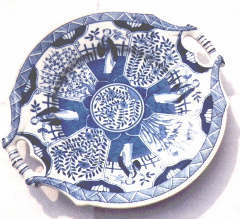 KI Schaaltje met sierlijke oren, met ronde Lange_Lijs patroon